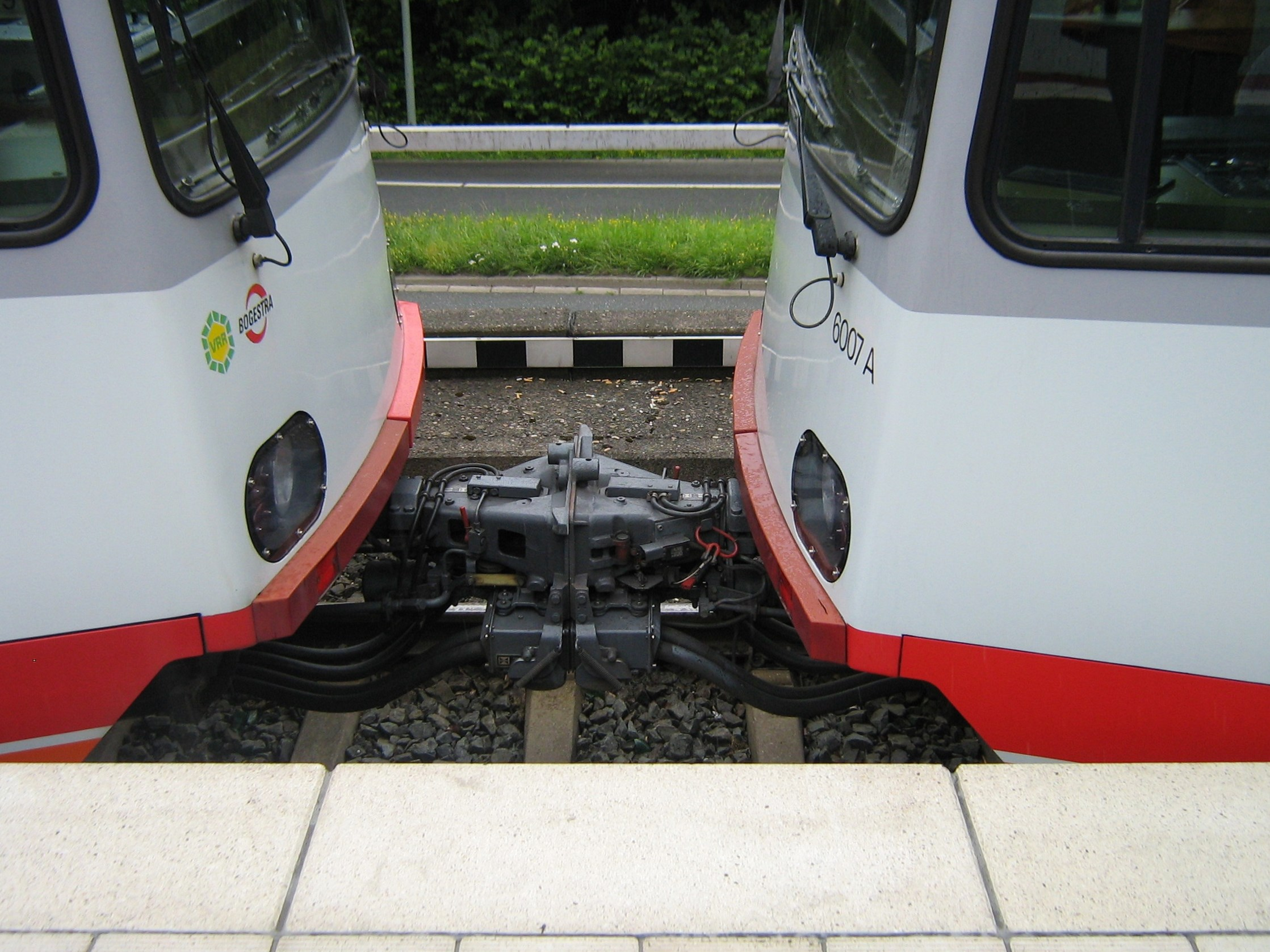 Zwei gekuppelte B-Wagen der Bogestra auf der Linie U35 in Bochum